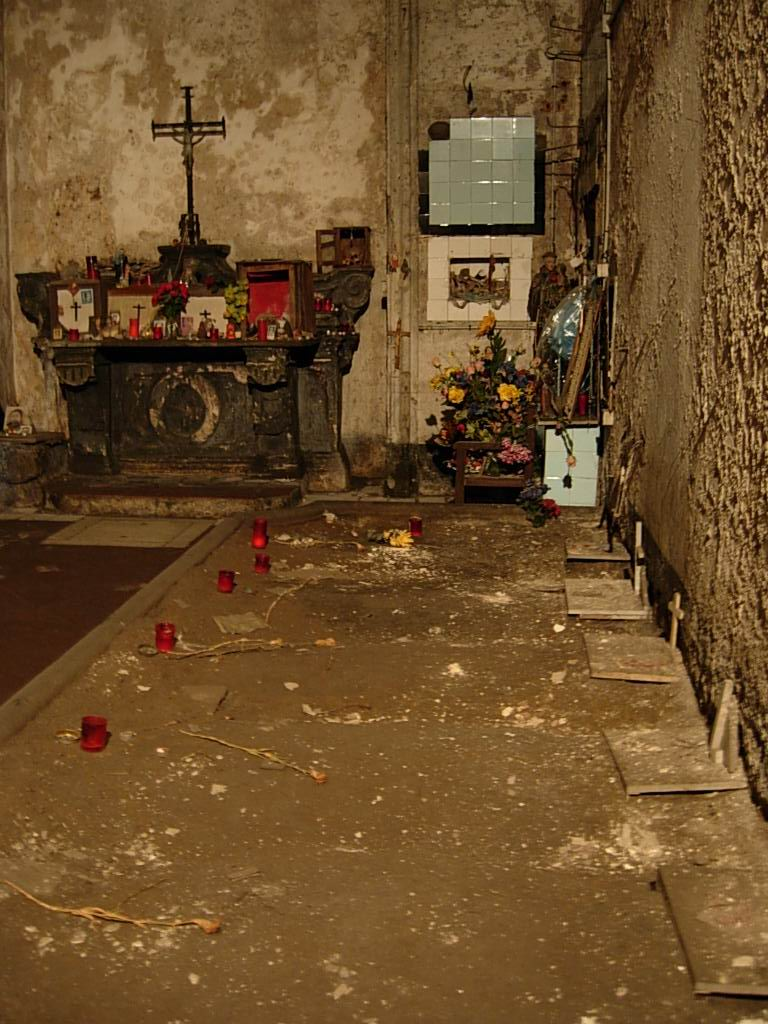 Ipogeo del Purgatorio ad Arco in napoli Foto personale